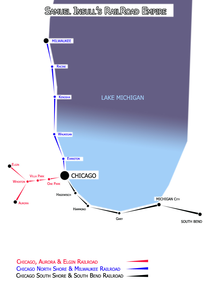 Een tekening door mijzelf gemaakt met Photoshop 7